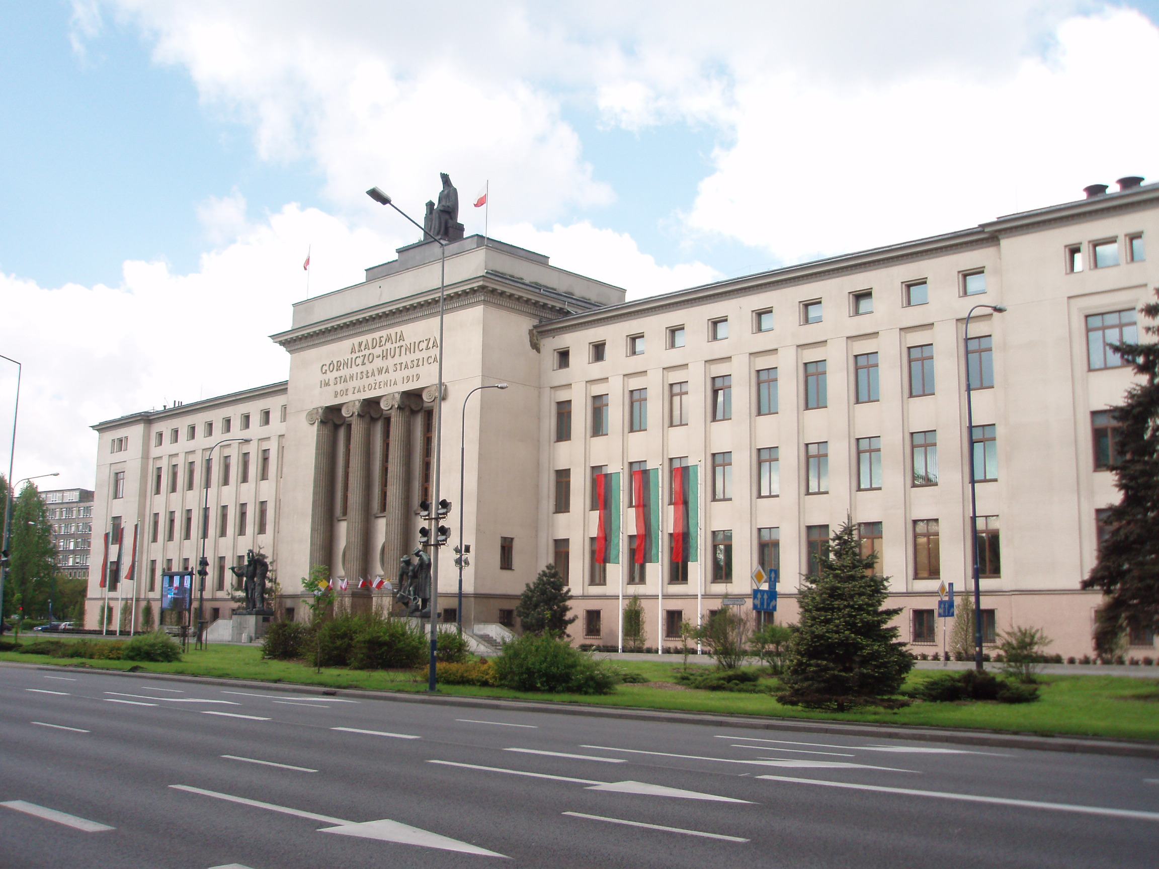 Akademia Górniczo-Hutnicza